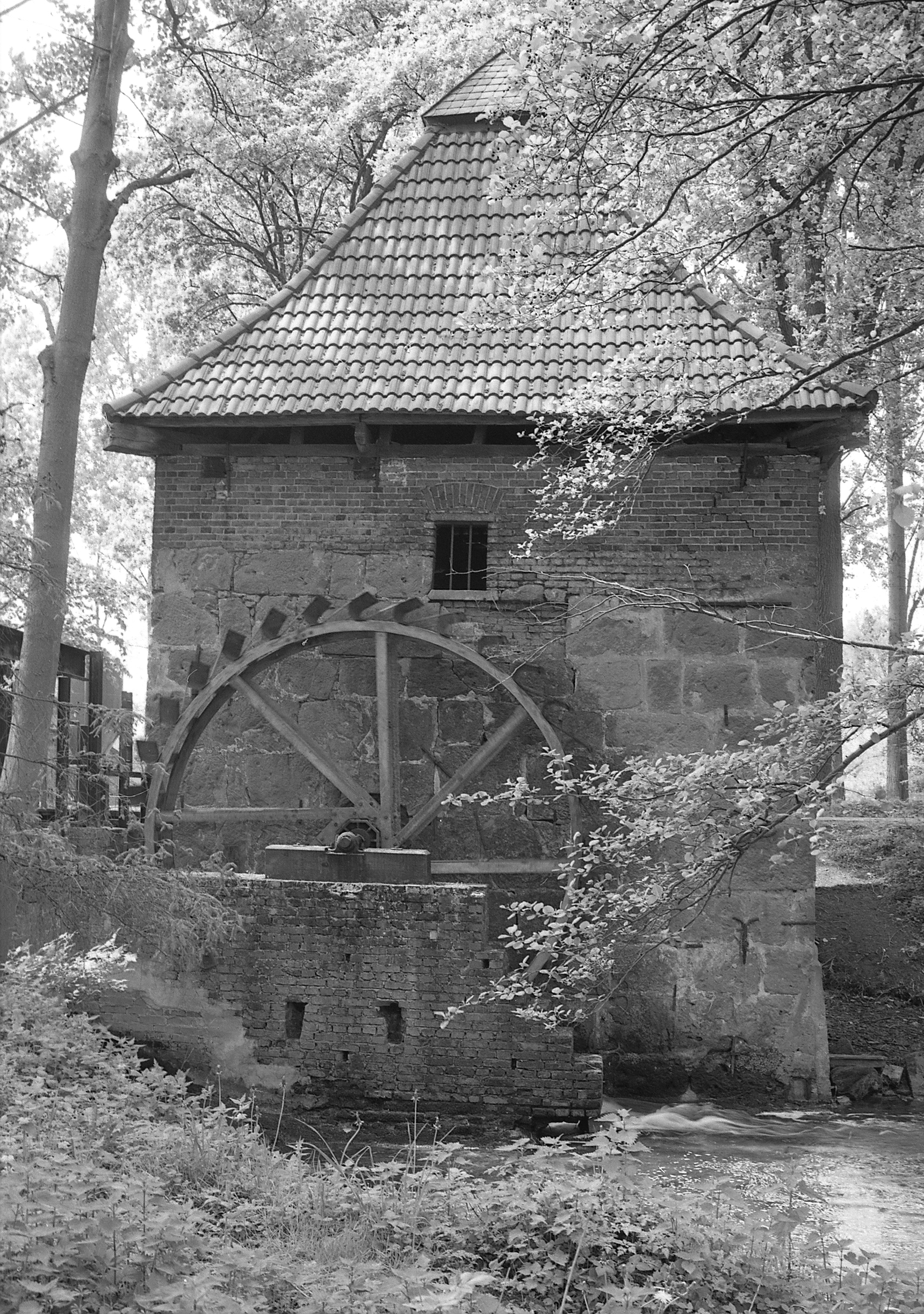 Wassermühle am Haus Döring in Borken. Foto erstellt im Juni 1986